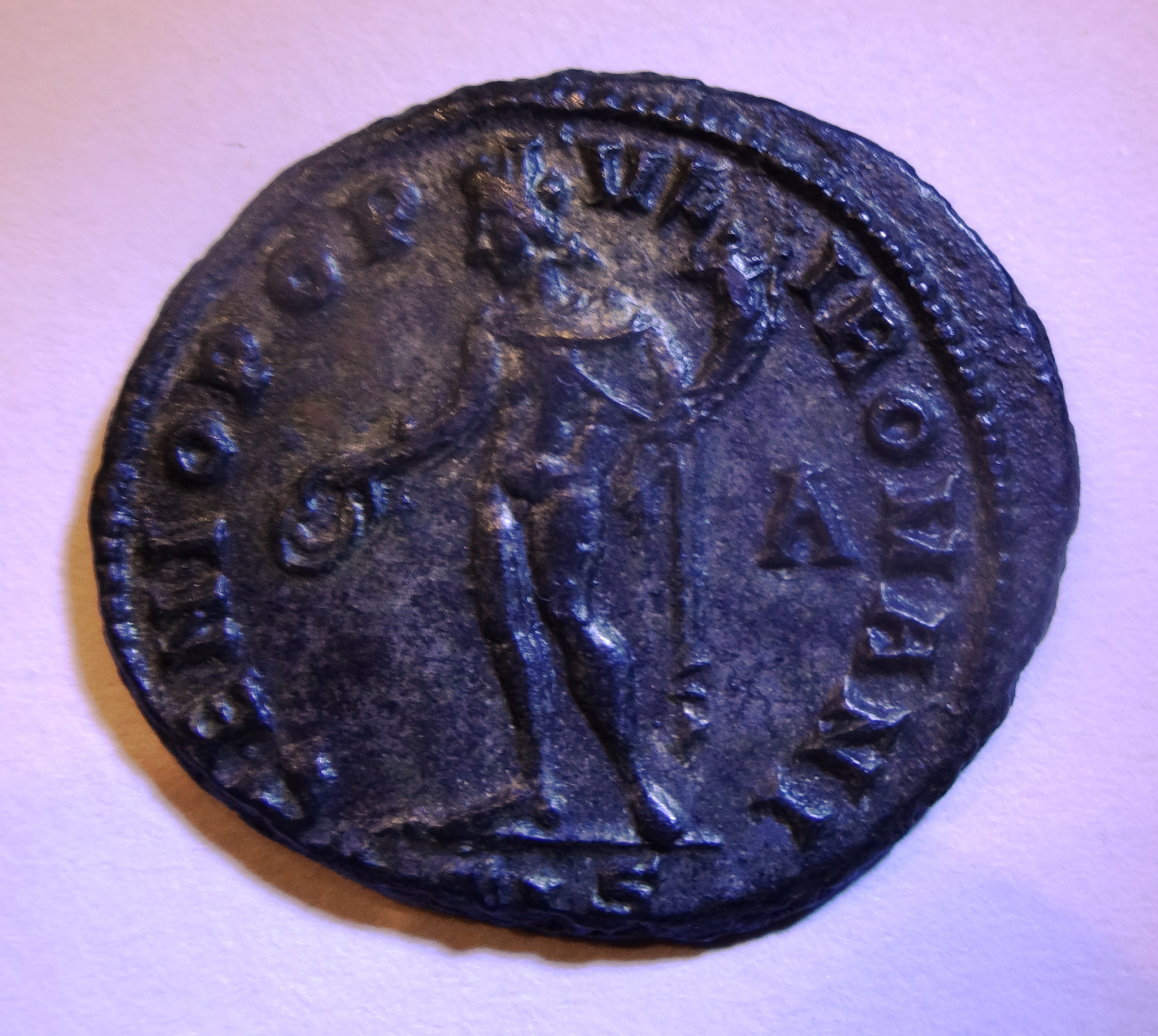 Genio Popoli Romani auf Follis des Diocletianus', Rückseite